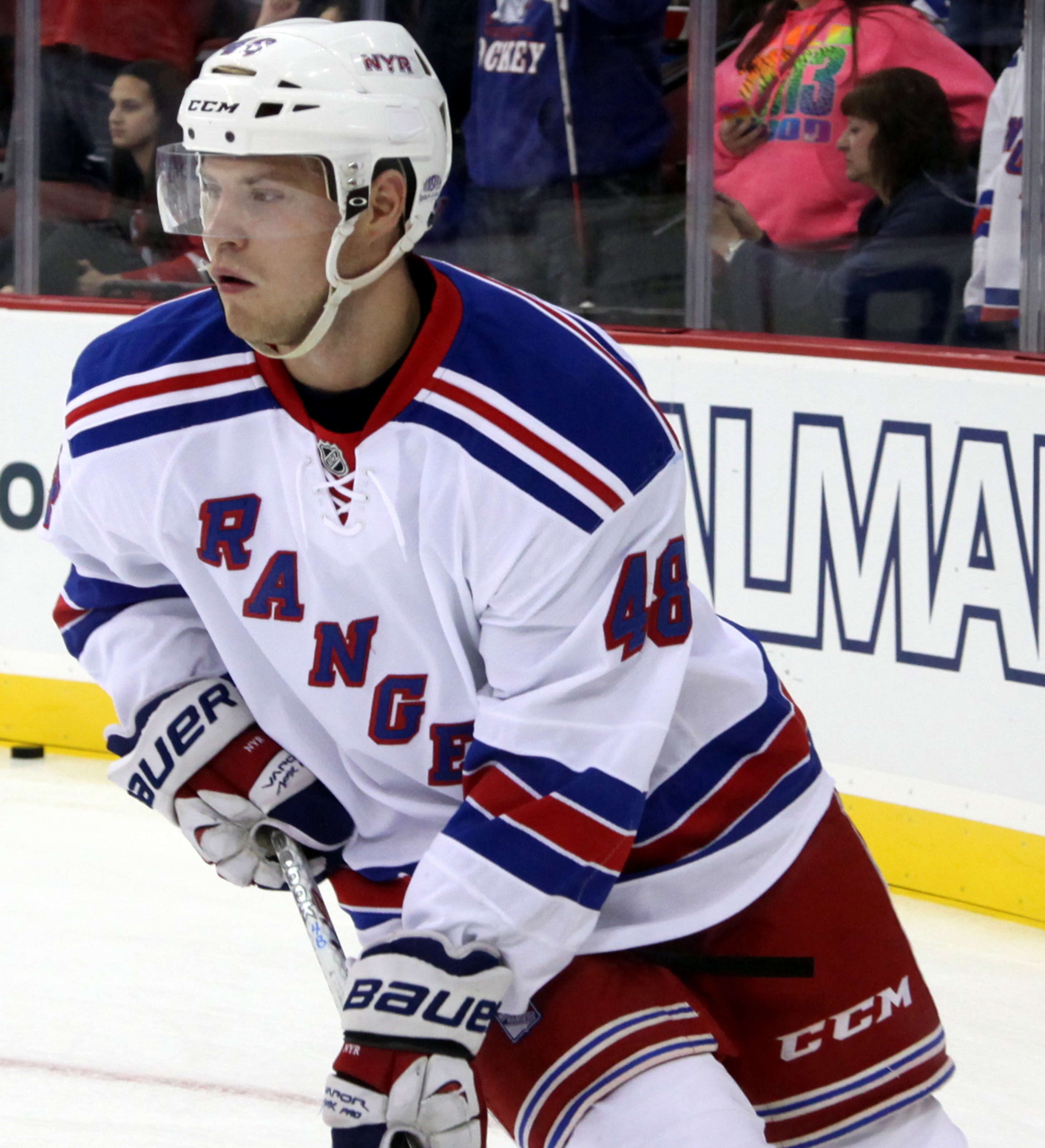 Lindberg in October 2014.